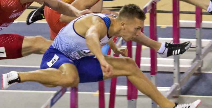 EKI20185 series 60mH martinot lagarde